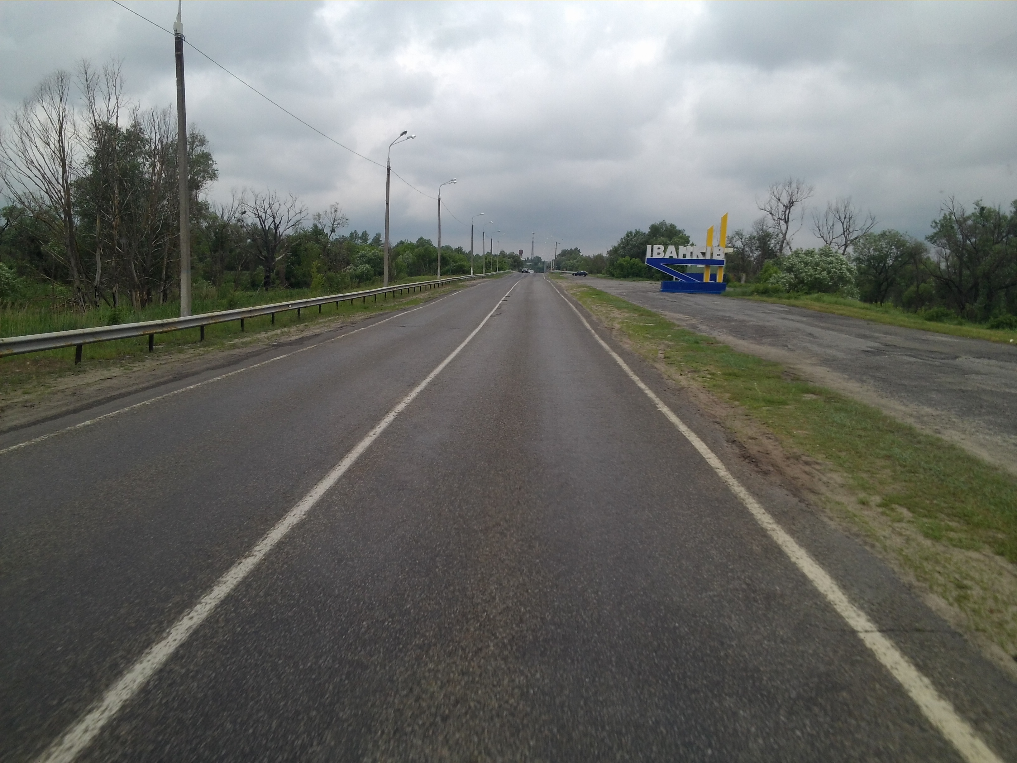 В`їзд до Іванкова